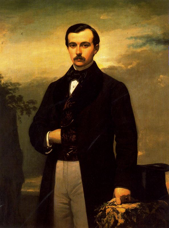 Retrato de José Maria Bernaldo de Quirós y Gonzalez de Cienfuegos, marqués de Campo Sagrado (1840-1911). Fue diplomático de carrera, Ministro Plenipotenciario de España en Constantinopla y Atenas, y Embajador en San Petersburgo; Diputado a Cortes electo diez veces,101 Senador del Reino, caballero Gran Cruz de Carlos III,102 maestrante de Granada y Gentilhombre de Cámara de S.M. con ejercicio.